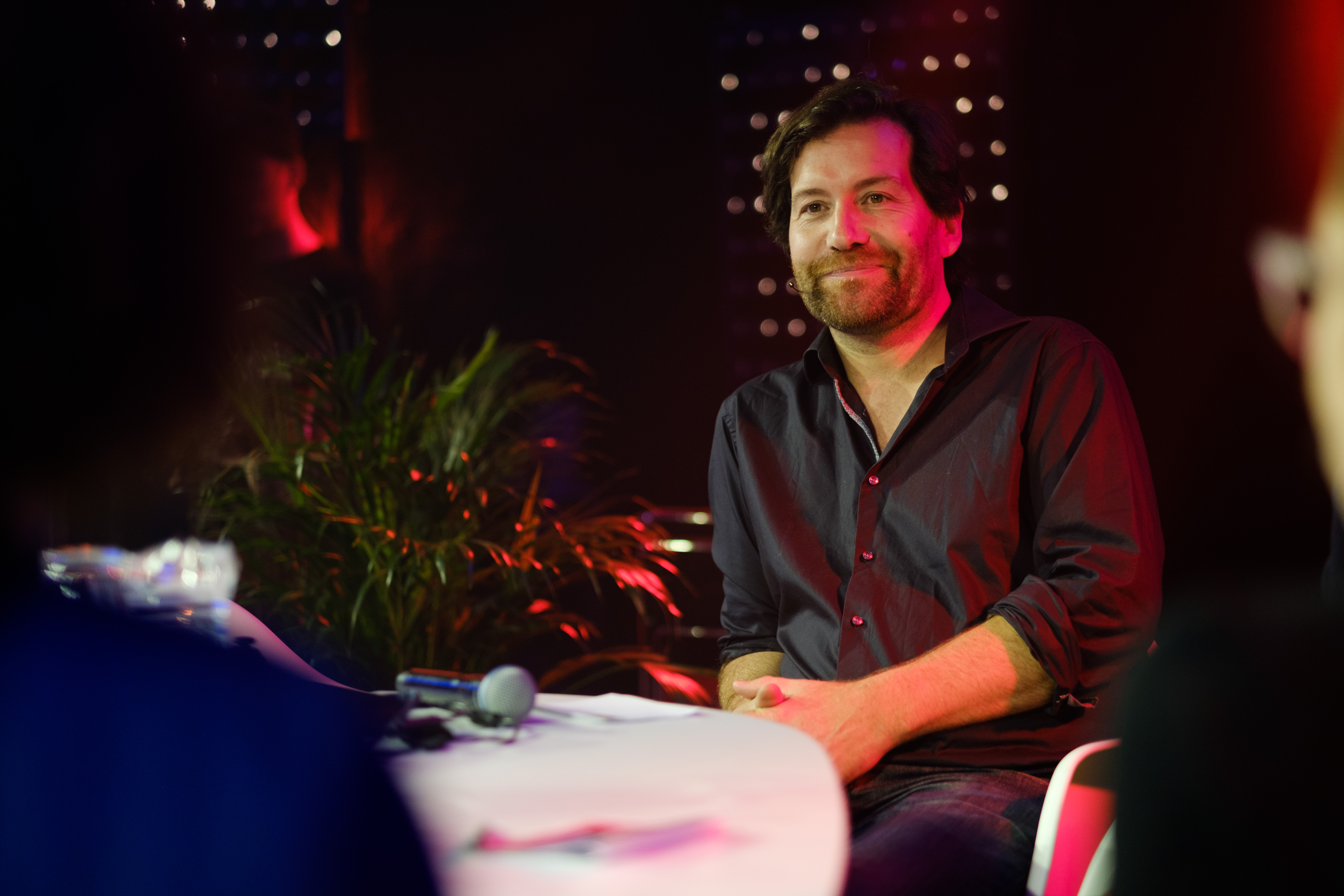 Hoe schat je actuele mediakunst op waarde? Makers en liefhebbers namen een favoriet werk mee naar Tussen Kunst & Glitch 2017. Ruimtelijke installaties, browser-based net art en objecten werden beoordeeld door expertpanel met onder andere Nadine Roestenburg, Michel van Dartel, Eric Kluitenberg en Jan Robert Leegte. Het panel plaatste het werk vervolgens in kunsthistorische-, culturele-, en digitale context met als hamvraag: is het kunst of is het glitch? De avond werd gepresenteerd door presentatrice en radio-dj Eva Cleven.